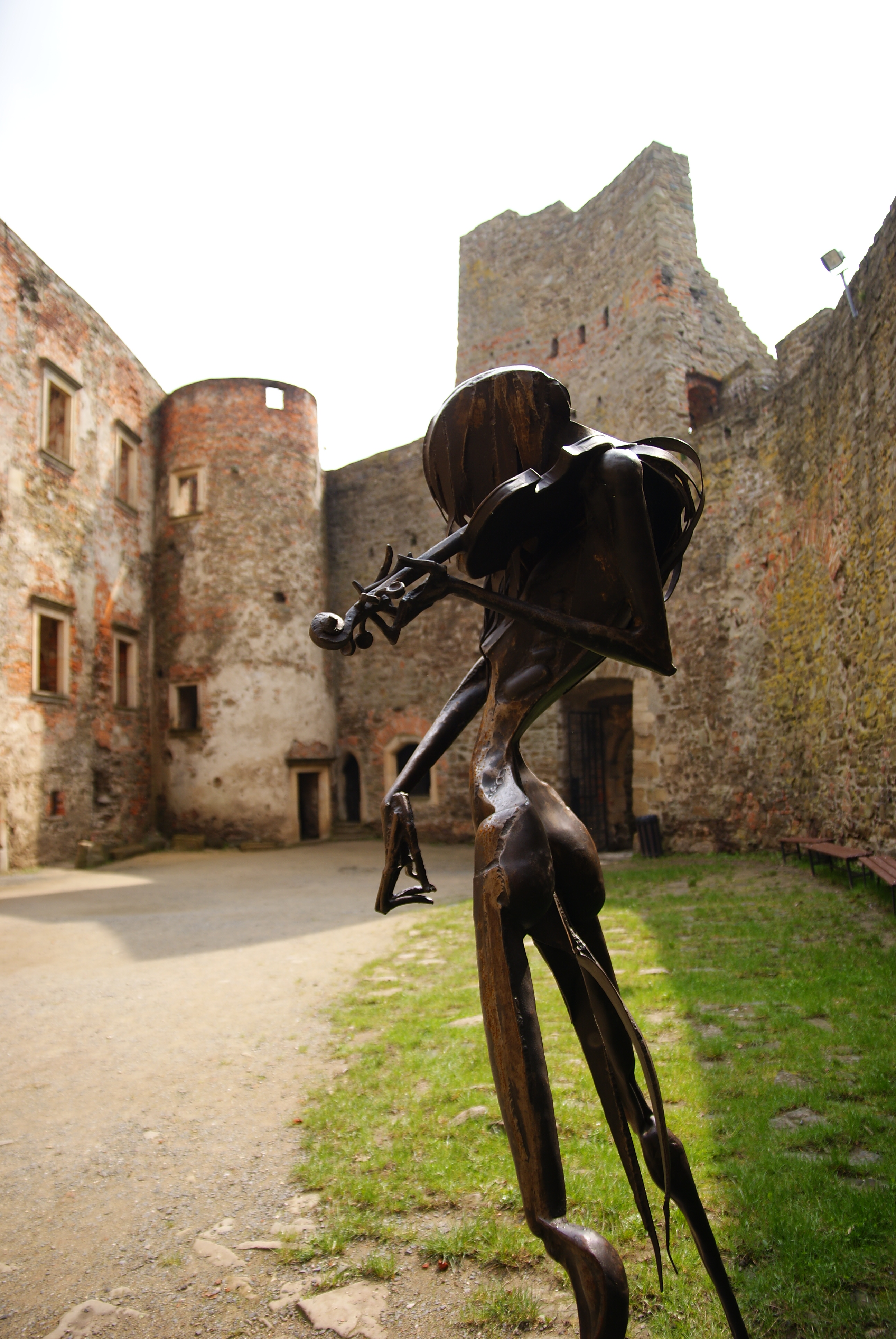 Hrad Helfštýn, zřícenina (Týn nad Bečvou), Týn nad Bečvou